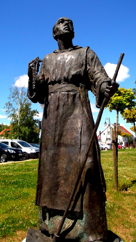 Krzeszów, pomnik cystersa - Ora et Labora - W hołdzie cystersom za duchowy i materialny wkład w rozwój ziemi kamiennogórskiej